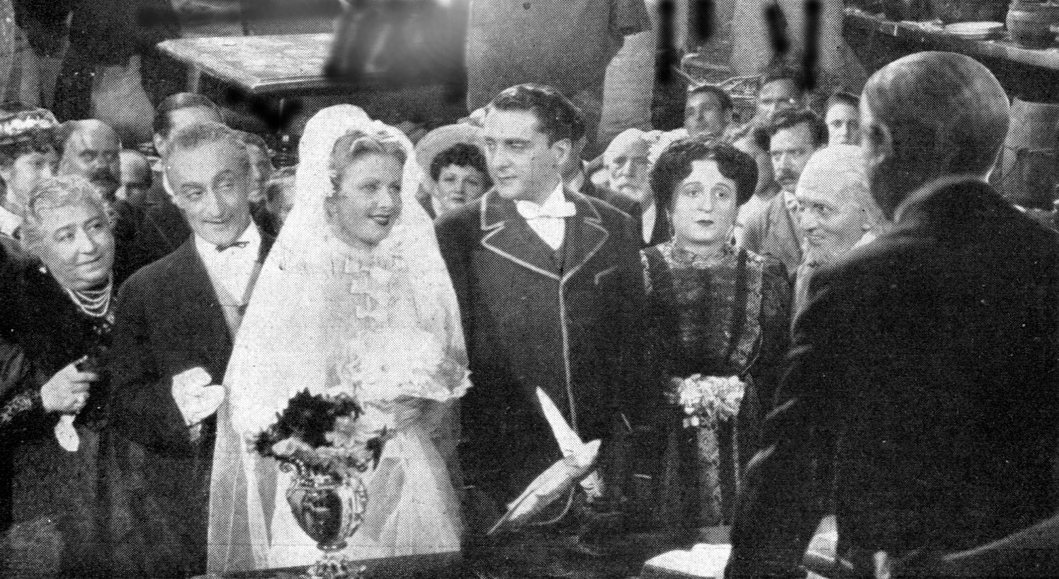 San Giovanni decollato film italiano, regia Amleto Palermi(1886-1941)1940, prod Capitani, Roma, 1940.- foto di scena del matrimonio con da sin: Bella Starace Sainati, Totò, Silvana Jachino, Osvaldo Genazzani e Titina De Filippo